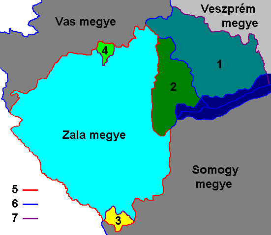 Zala megye kialakítása 1950-ben. 1. Zala megyétől Veszprémhez, 2. Zala megyétől Veszprémhez 1978. december 31-éig, 3. Somogy megyétől Zalához, 4. Vas megyétől Zalához, 5. Zala megye 1950-től, 6. mai megyehatár, 7. megszűnt 1949-es megyehatár